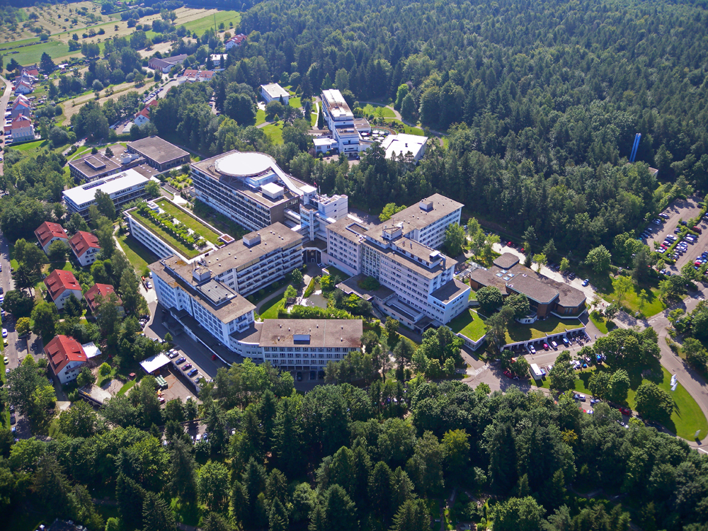 Luftbild des SRH Klinikums Karlsbad-Langensteinbach im Jahre 2012 nach Inbetriebnahme des neuem Hubschrauberlandeplatzes